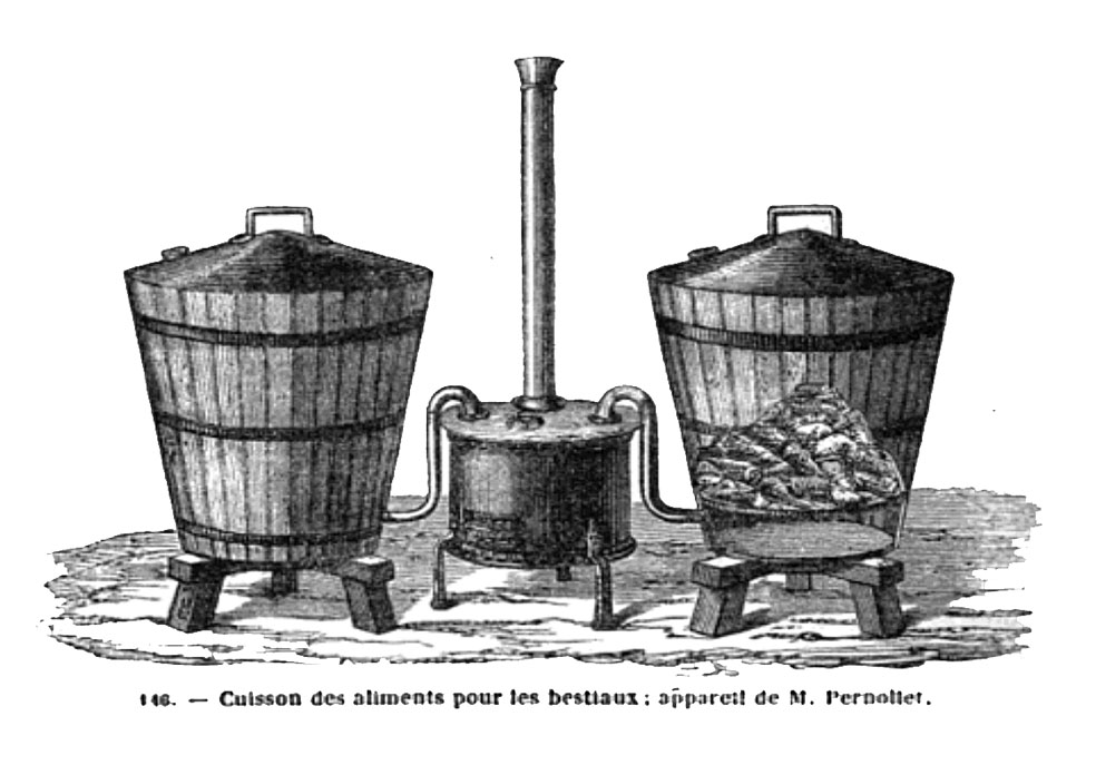 appareil de Pernollet avec centrale à vapeur et 2 cuves de cuisson